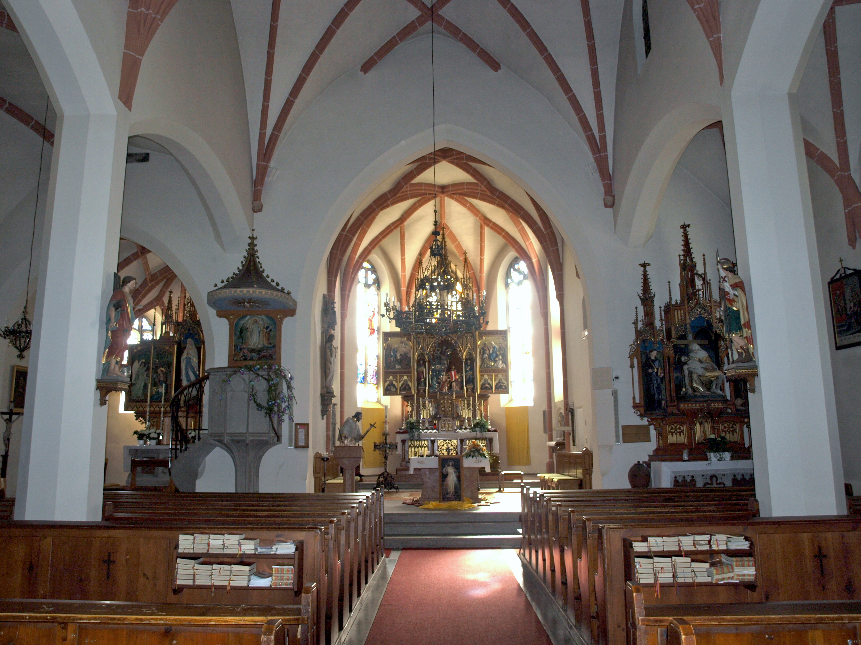 Kath. Pfarrkirche hl. Georg und Friedhof